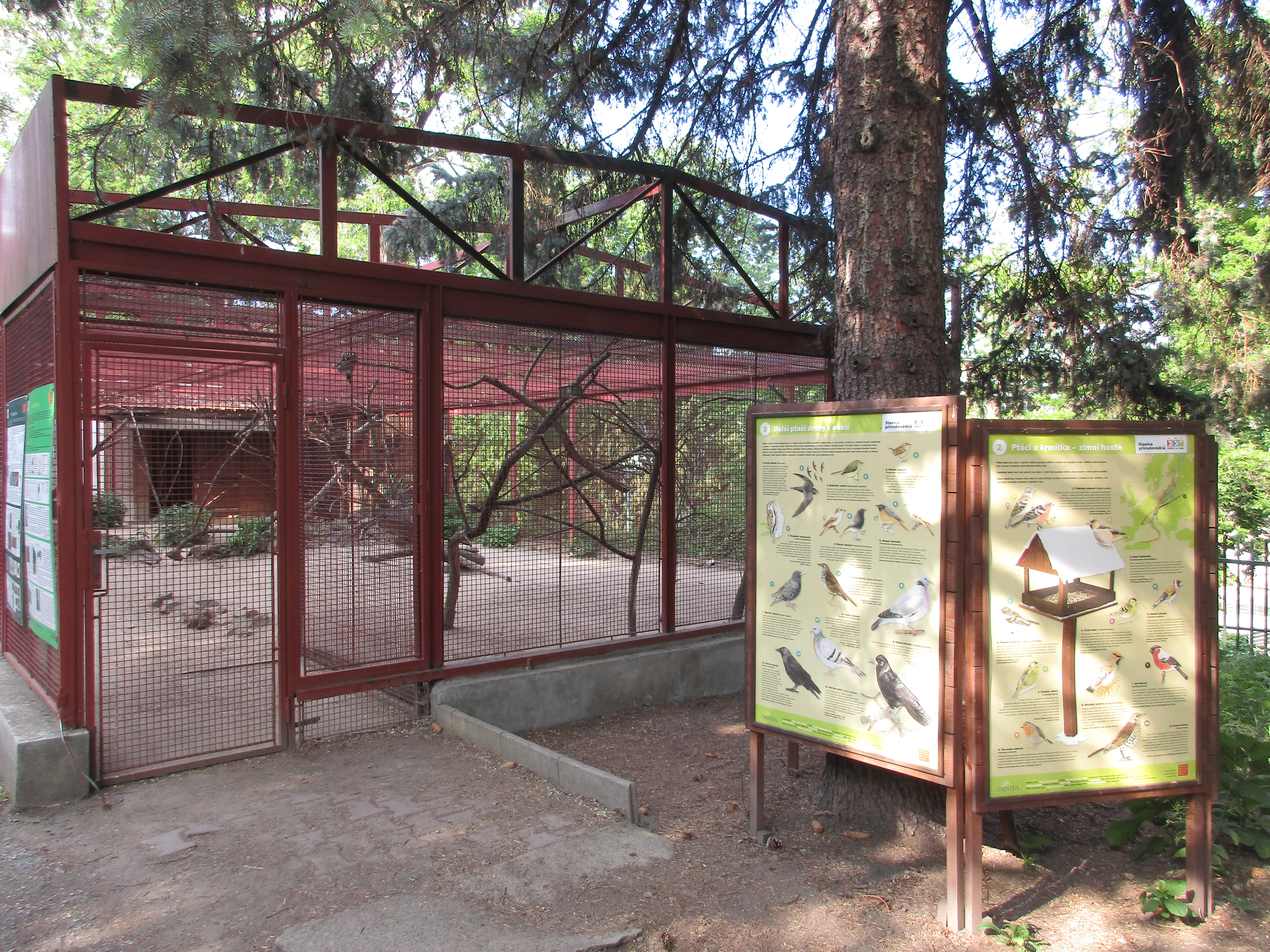 Stanice přírodovědců DDM hl. m. Prahy. Drtinova 1a, Praha 5-Smíchov.